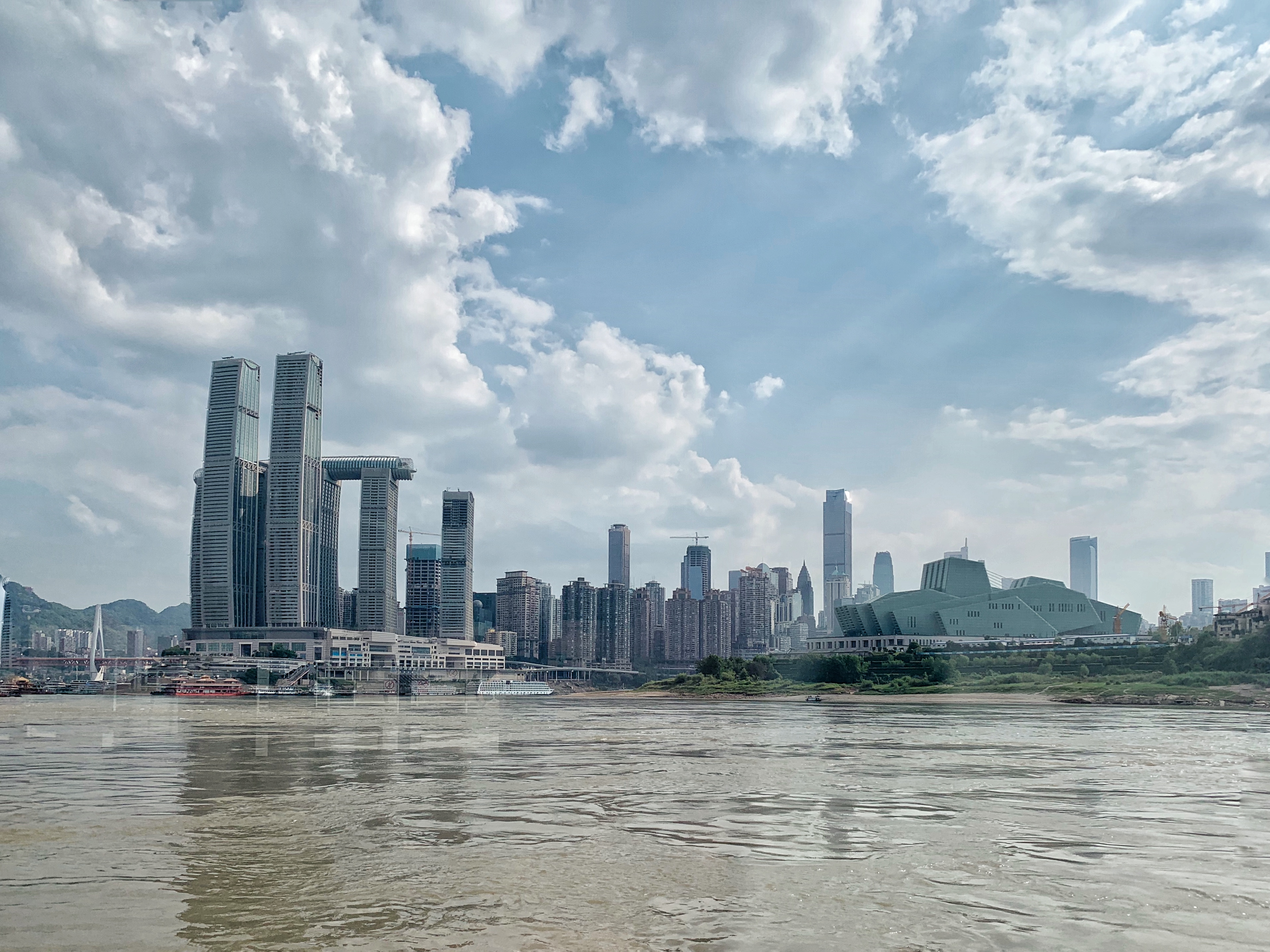 中文（中国大陆）: 摄于长江（由重庆交运运营的朝天门 - 江北嘴 - 弹子石游船）的即将营业的重庆来福士广场